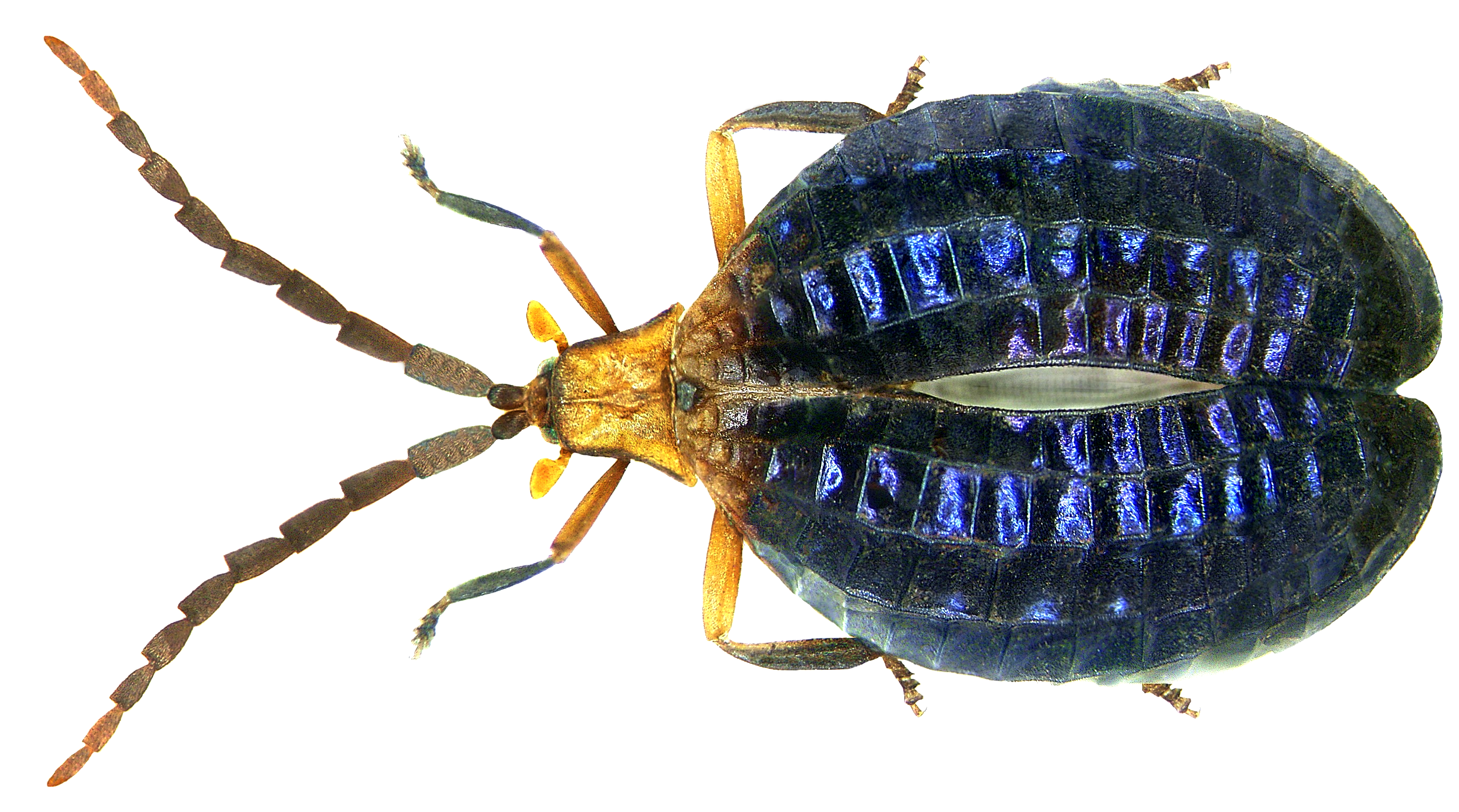 Familie: Lycidae Groesse: 11 mm Fundort: Indonesien, Sulawesi, Sawangan, 2004 Photo: U.Schmidt, 2007